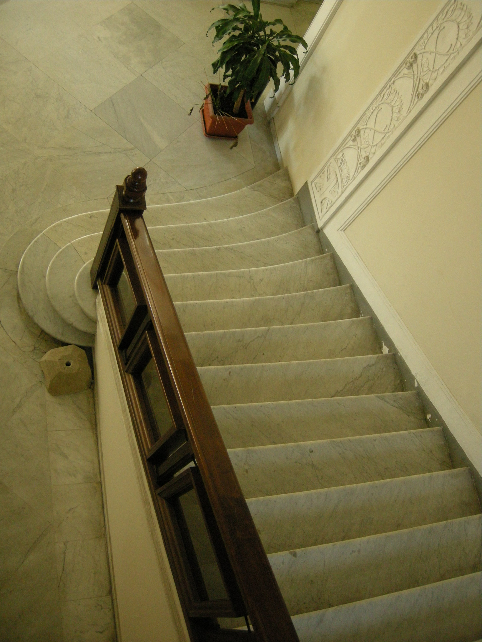 Grand hotel corallo, interno, scale